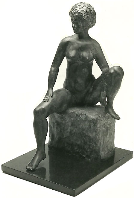 Fotografia de escultura em bronze. Delton Capozzi